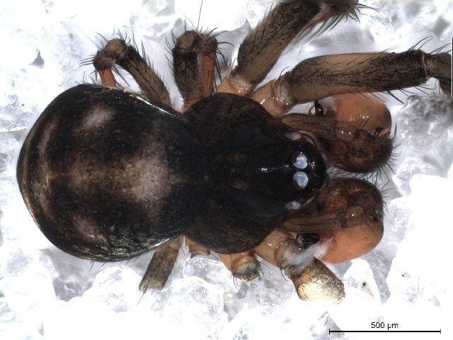 Baalzebub baulo